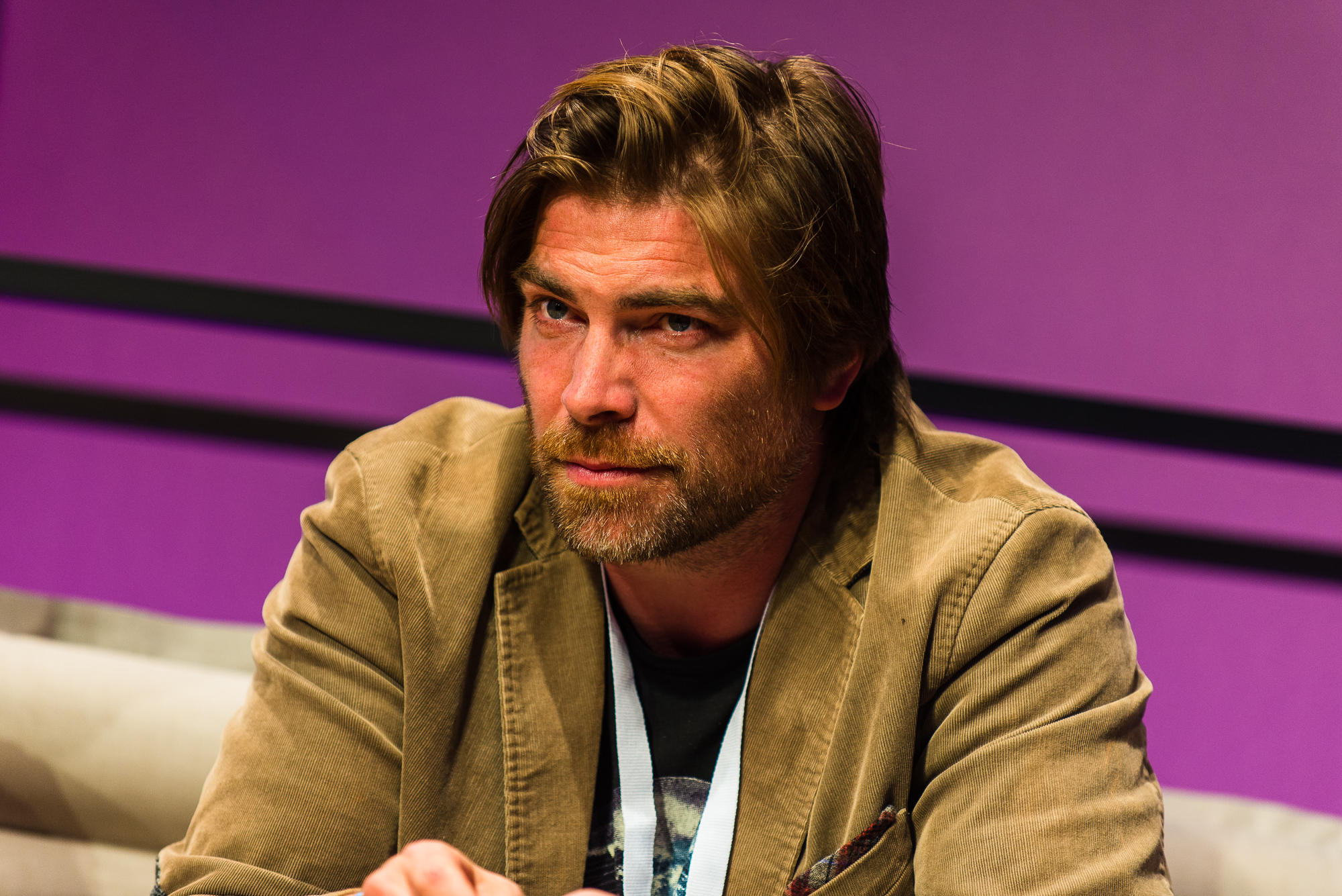 Morten Lund auf der NEXT Berlin 2014.